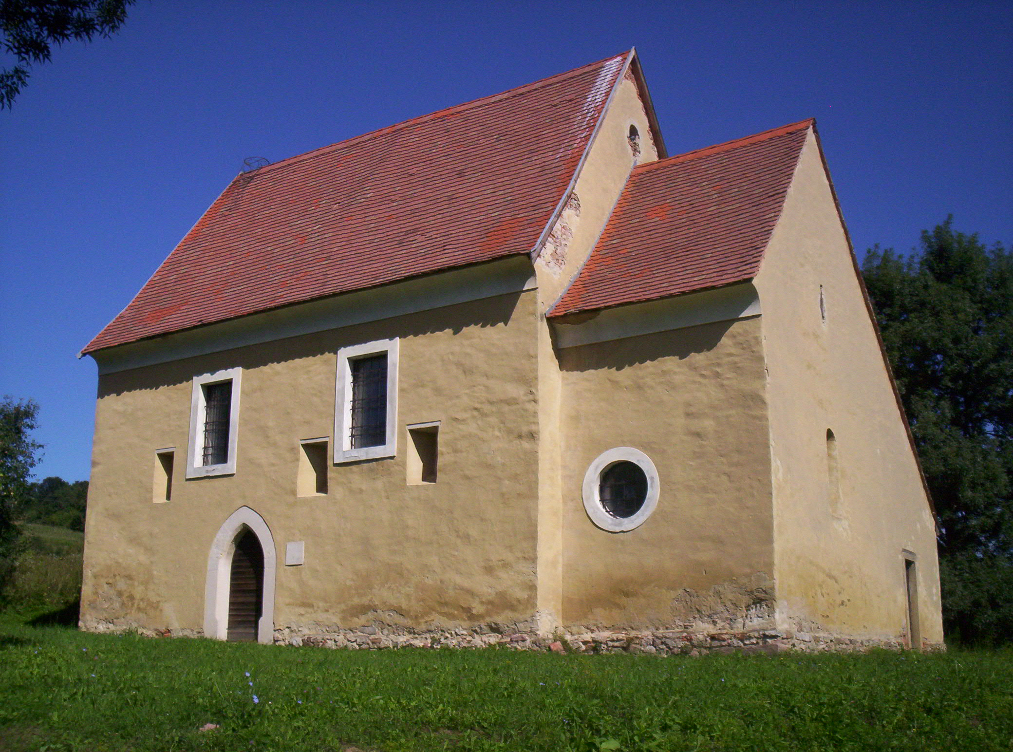 A hetvehelyi Árpád-kori templom (a 13. század körül épült templomot 1790-ben alakították át)– photo taken by uploader User:Csanády in 2006. Medieval church built during the reign of the Árpád kings, cca. 13th century. Rebuilt in 1790.